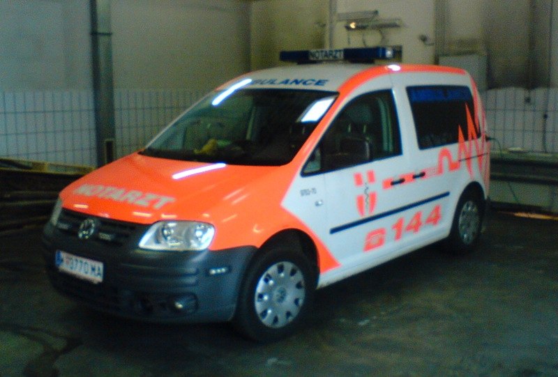 Notarzteinsatzfahrzeug der Wiener Berufsrettung